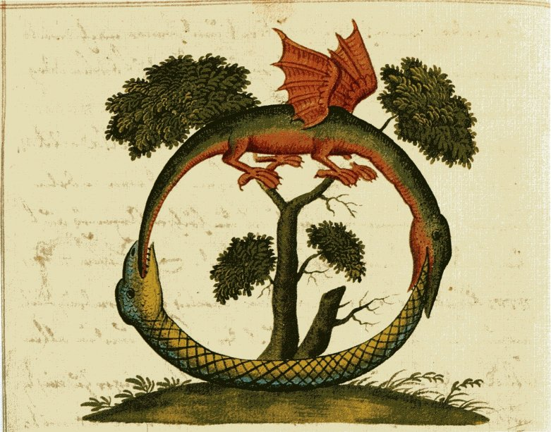 Immagine del manoscritto Zoroaster Clavis Artis, MS. Verginelli-Rota, Biblioteca dell'Accademia Nazionale dei Lincei, Roma, vol. 2, p. 18